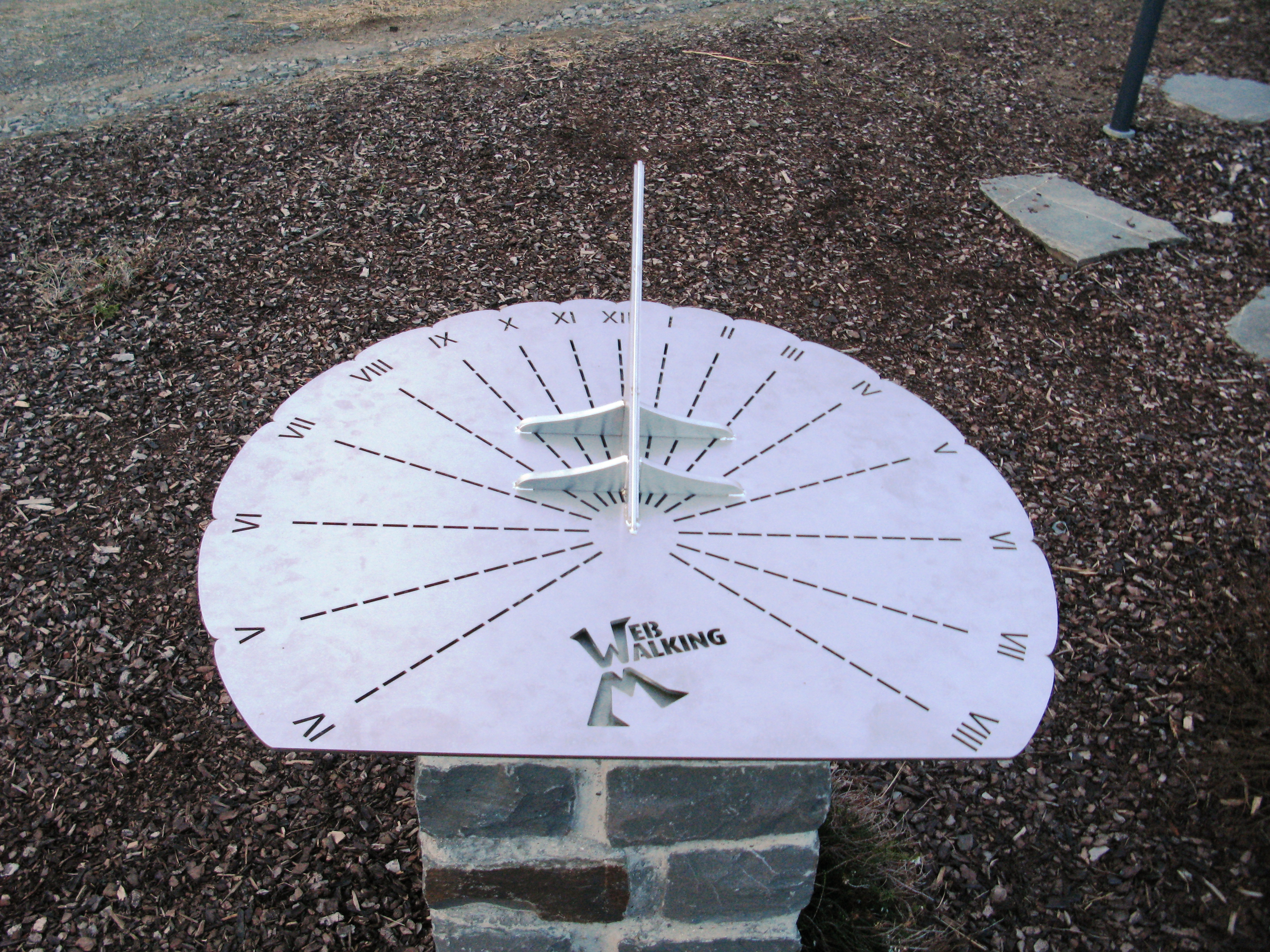 Sonnenuhr am Kiischpelter Sonnenkreis